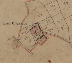 Els Casals, de Serrallonga, en el Cadastre napoleònic del 1812 (Arxius Departamentals dels Pirineus Orientals)